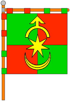 Прапор с. П'ятка